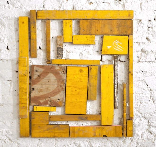 aus der Serie Yellowuniverse, Flatland